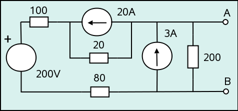 Circuito ejemplo (Example circuit)